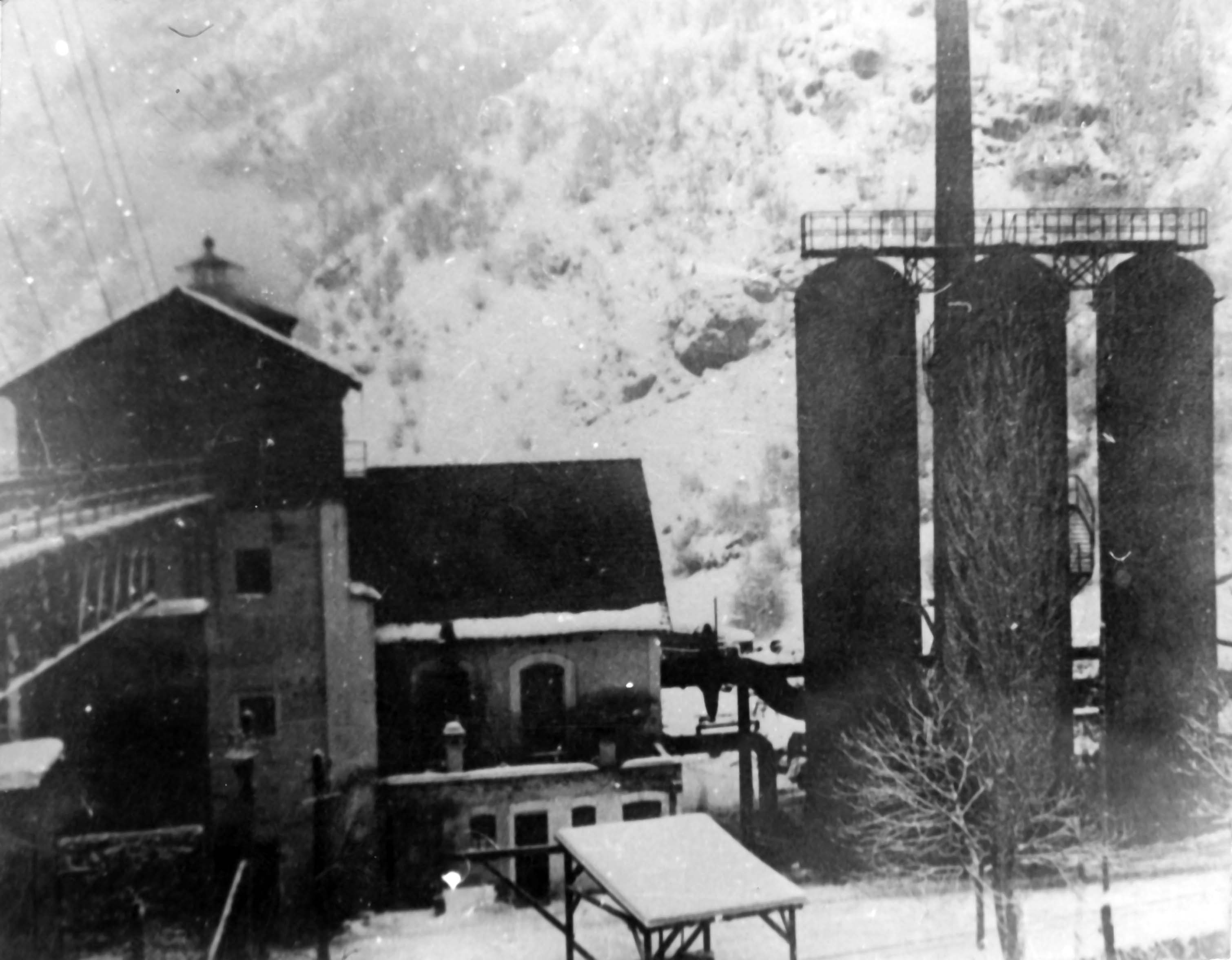 A govasdiai nagyolvasztó Cowper-féle léghevítővel